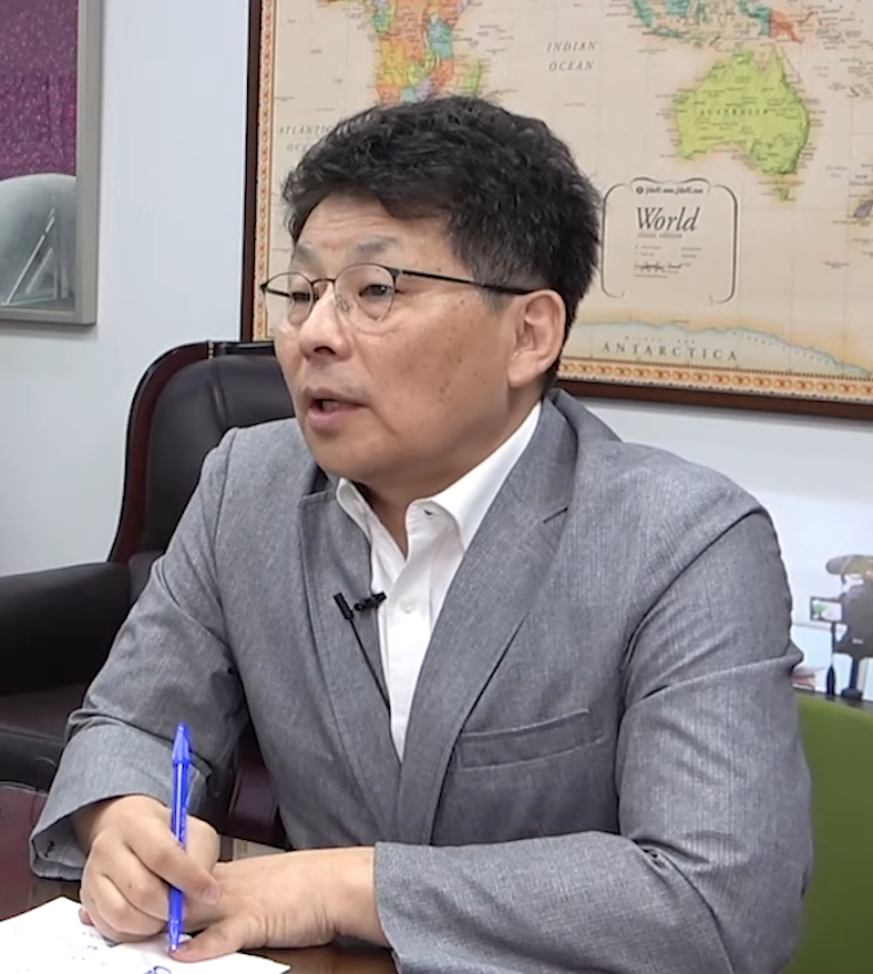 이언주TV에 나온 차명진 전 의원.